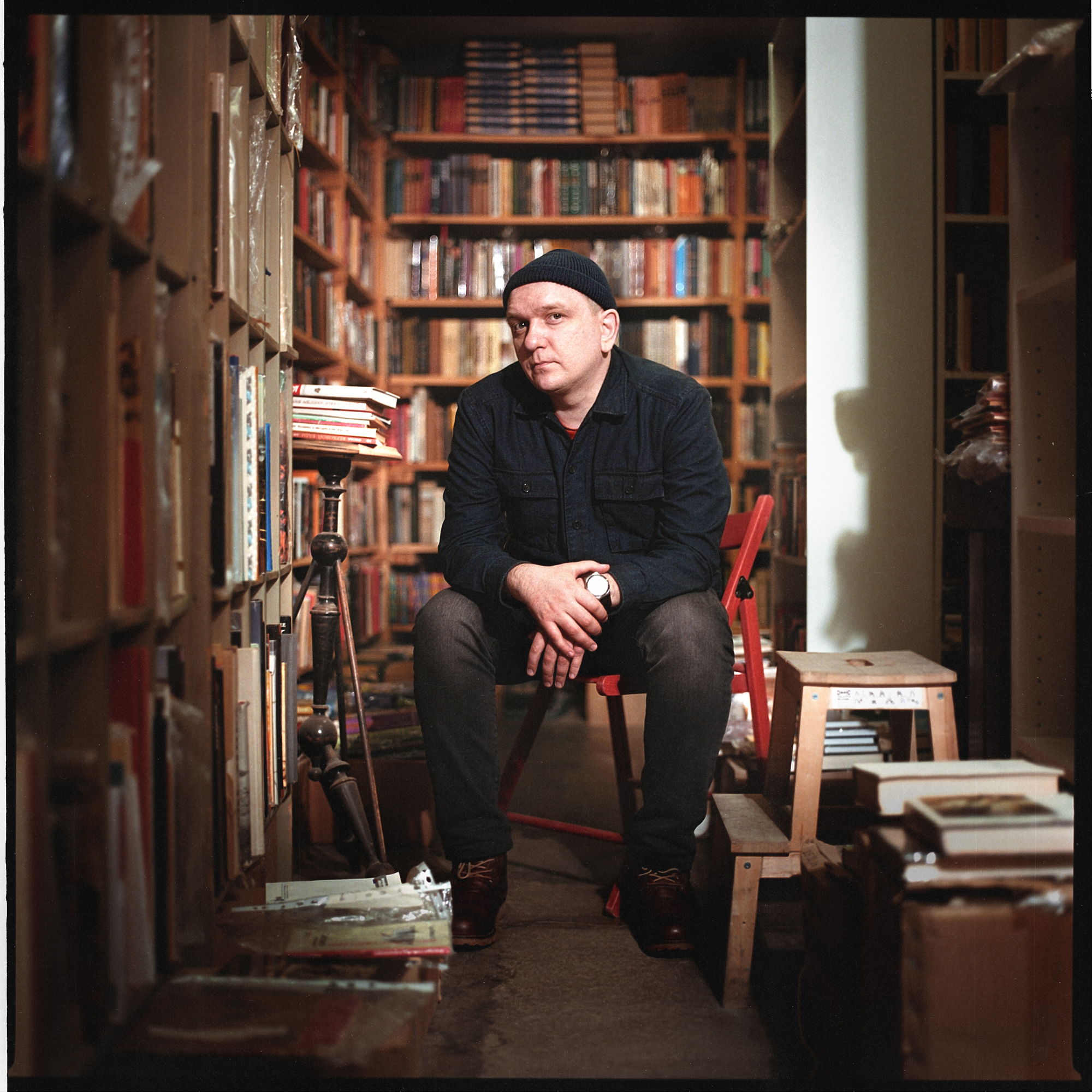 Человек, стоявший у истоков уральской рэп-школы.